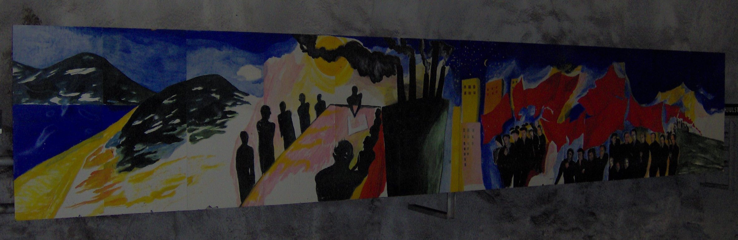 Artwork at the Stockholm metro station Hjulsta.